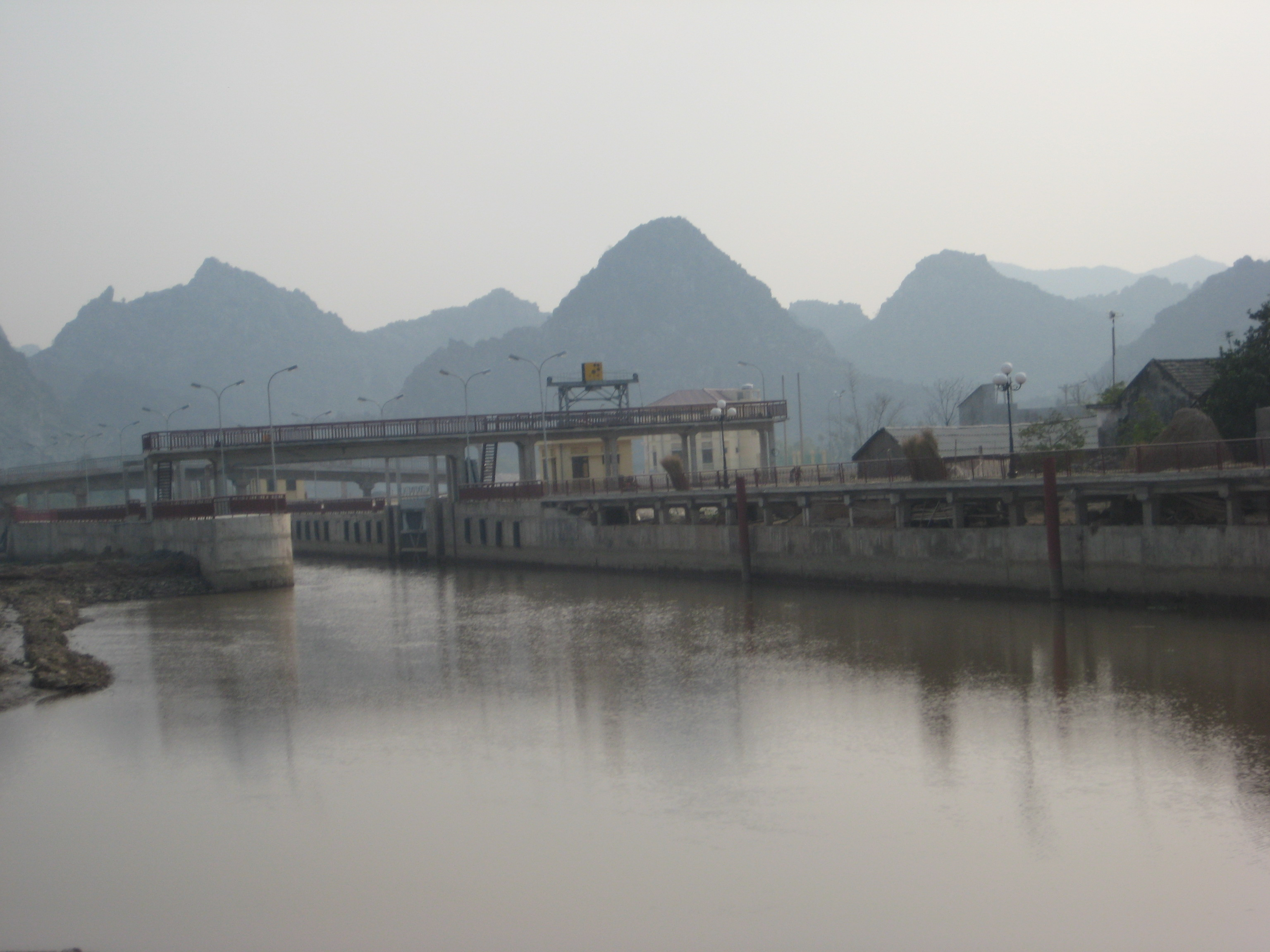 Cửa biển Thần Phù ở Ninh Bình.